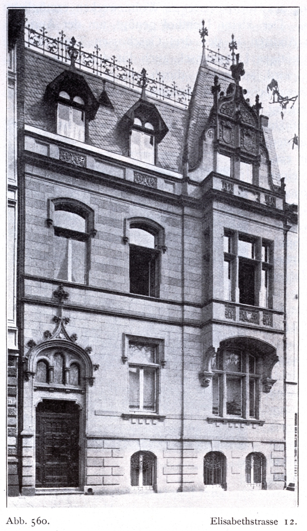 Haus Elisabethstraße 12 in Düsseldorf, erbaut von 1897 bis 1898 von Architekt Ernst Röting.jpg